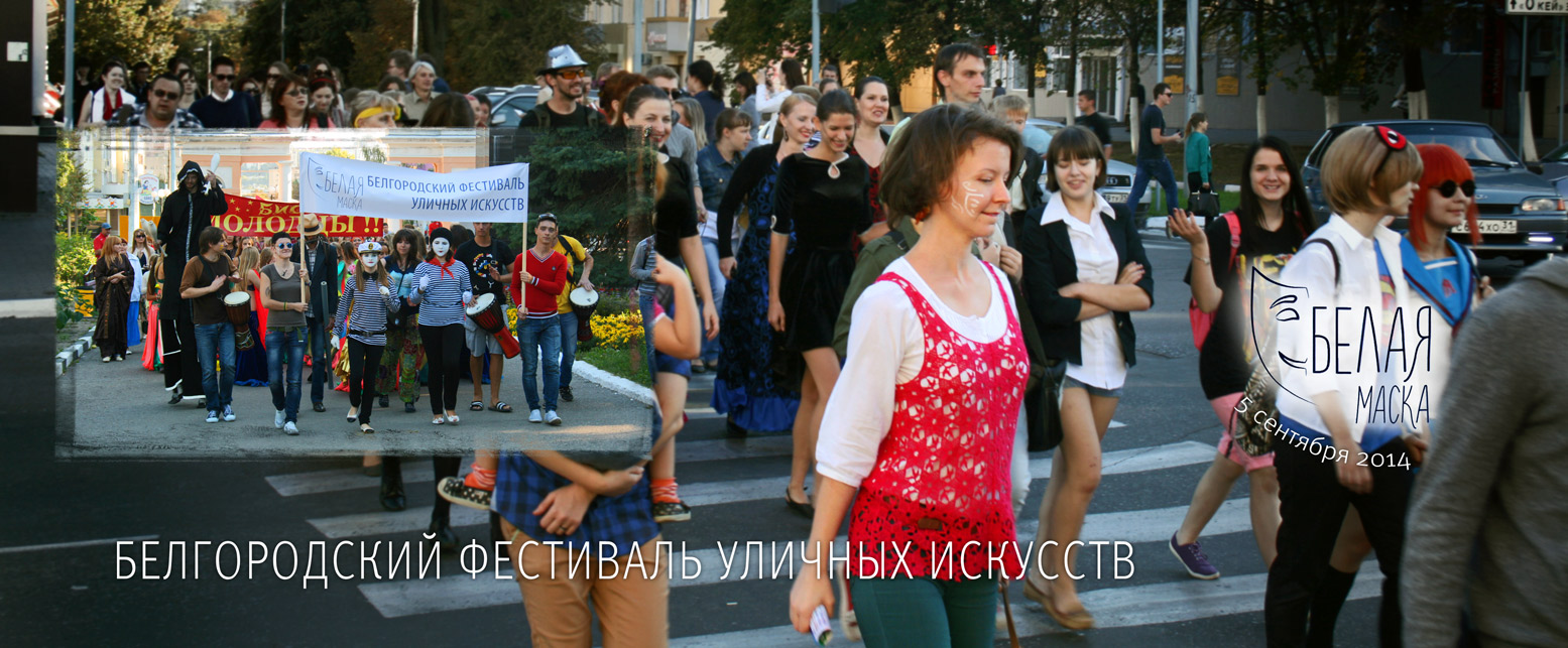 Первый день фестиваля уличных искусств «Белая маска». Белгород, 5 сентября 2014.